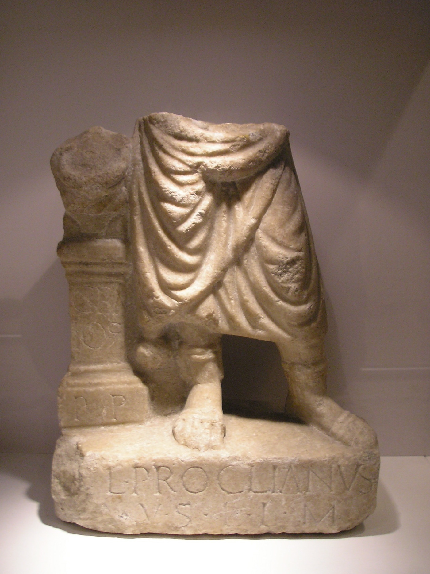 Sockel: GENIO (centuriae)/ P(rimi) P(ili) / [I]VL(ius) PROCLIANVS/ [C(ustos)] A(rmorum) V(otum) V(olvit) L(ibens) L(aetus) M(erito) . Genius einer Zenturie. Wien 1, Bauernmarkt 9, 1900. Marmor, 3. Jh. n. Chr. Genien galten als Schutzgottheiten der Kaiserfamilie, von Körperschaften oder Vereinen aber auch für bestimmte Orte. Sie sind häufig in militärischen Lagern und Kastellen belegt. Hier wurden ihre Weihestatuetten zum Schutz der Hauptgebäude und der Mannschaftsbaracken aufgestellt. Diese Geniusweihung des custos armorum (Waffenmeister) Iulius Proclianus stammt aus einer Kaserne der 1. Kohorte.